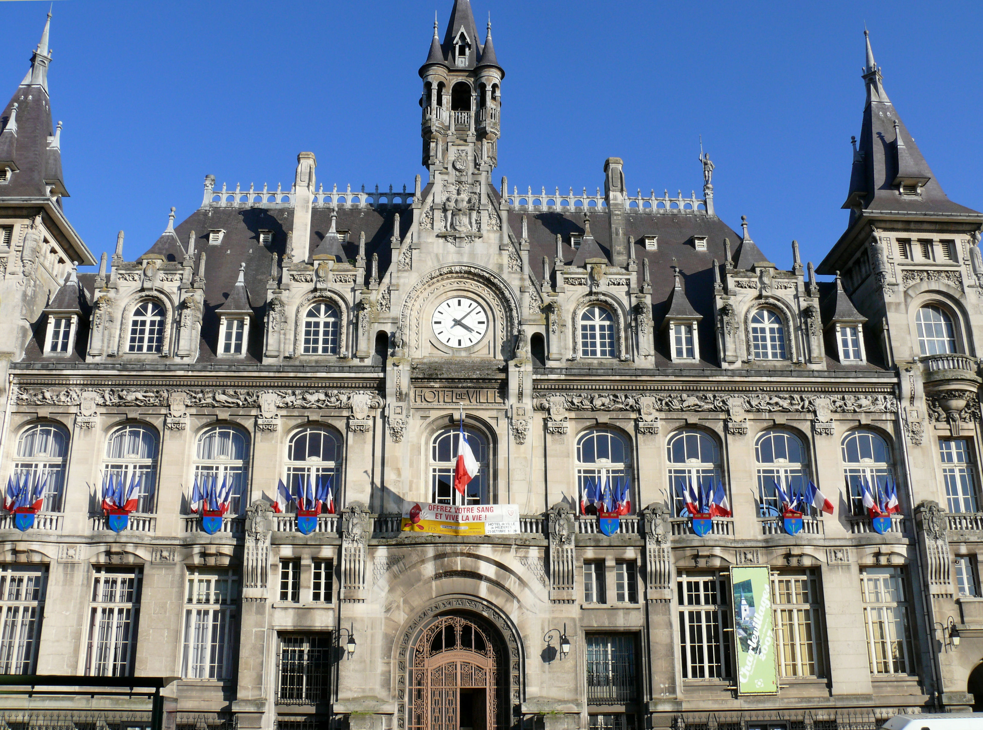 Hôtel de ville de Mézières (Charleville-Mézières)